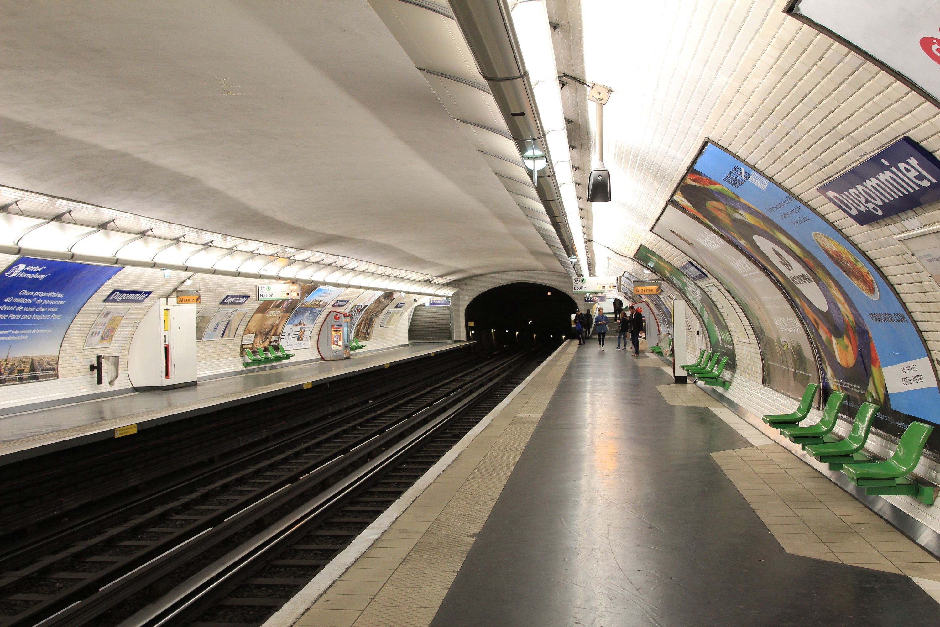 Quais de la station Dugommier du métro de Paris, vues en direction de Charles de Gaulle - Étoile.